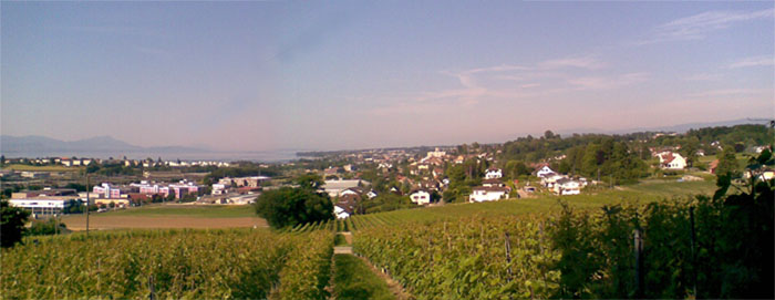 Montage de deux photos prises depuis les Abbesses à Echandens